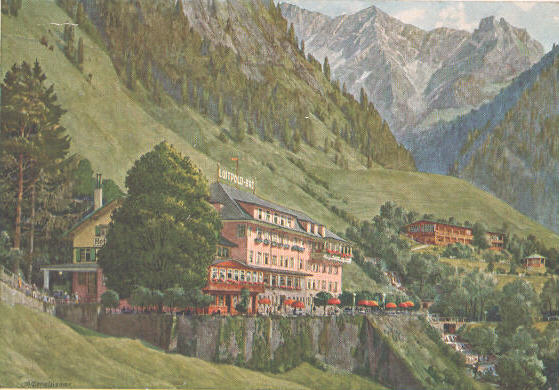 Gemälde/Postkartenmotiv von Michael Zeno Diemer